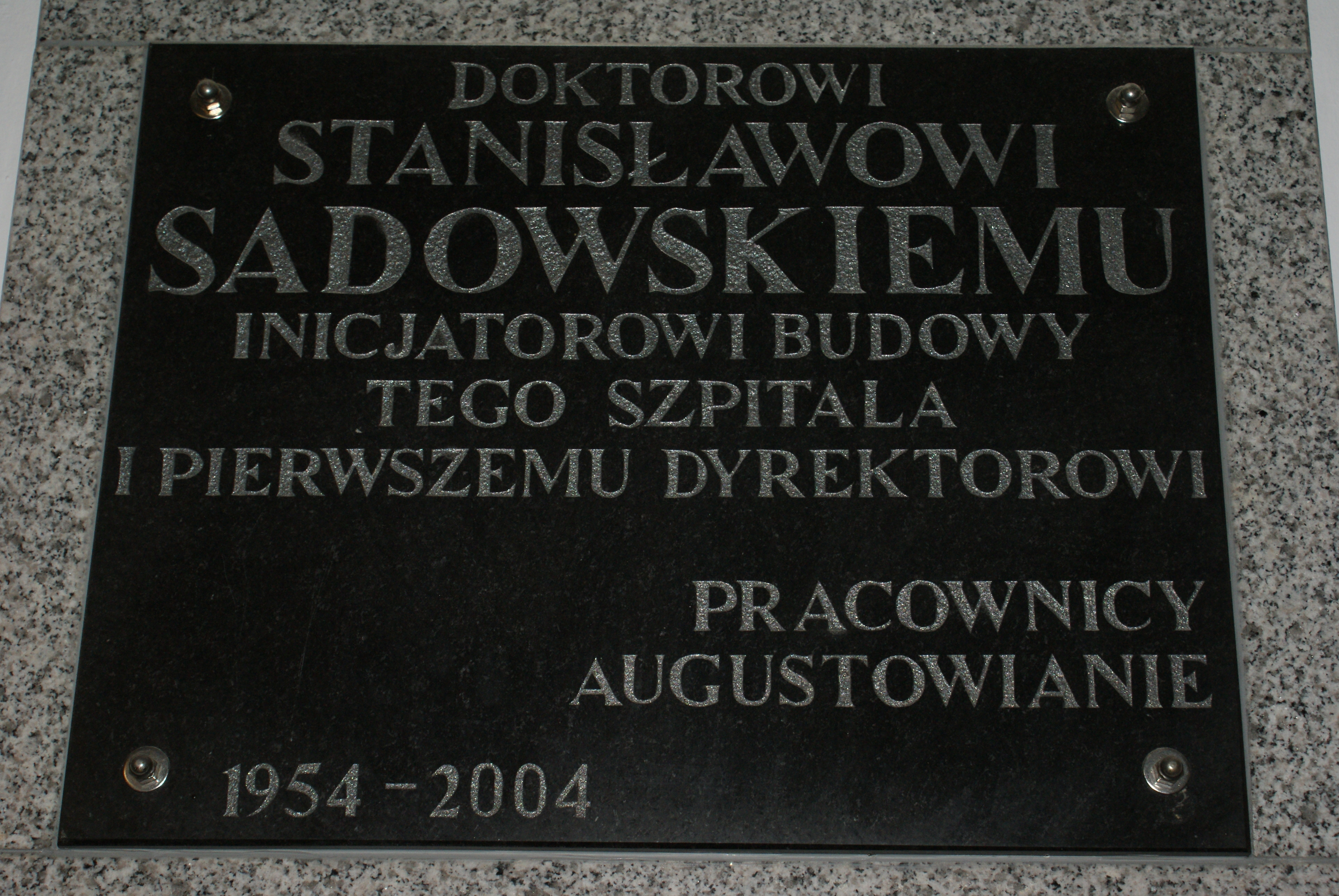 Tablica pamiątkowa w szpitalu augustowskim poświęcona Stanisławowi Sadowskiemu